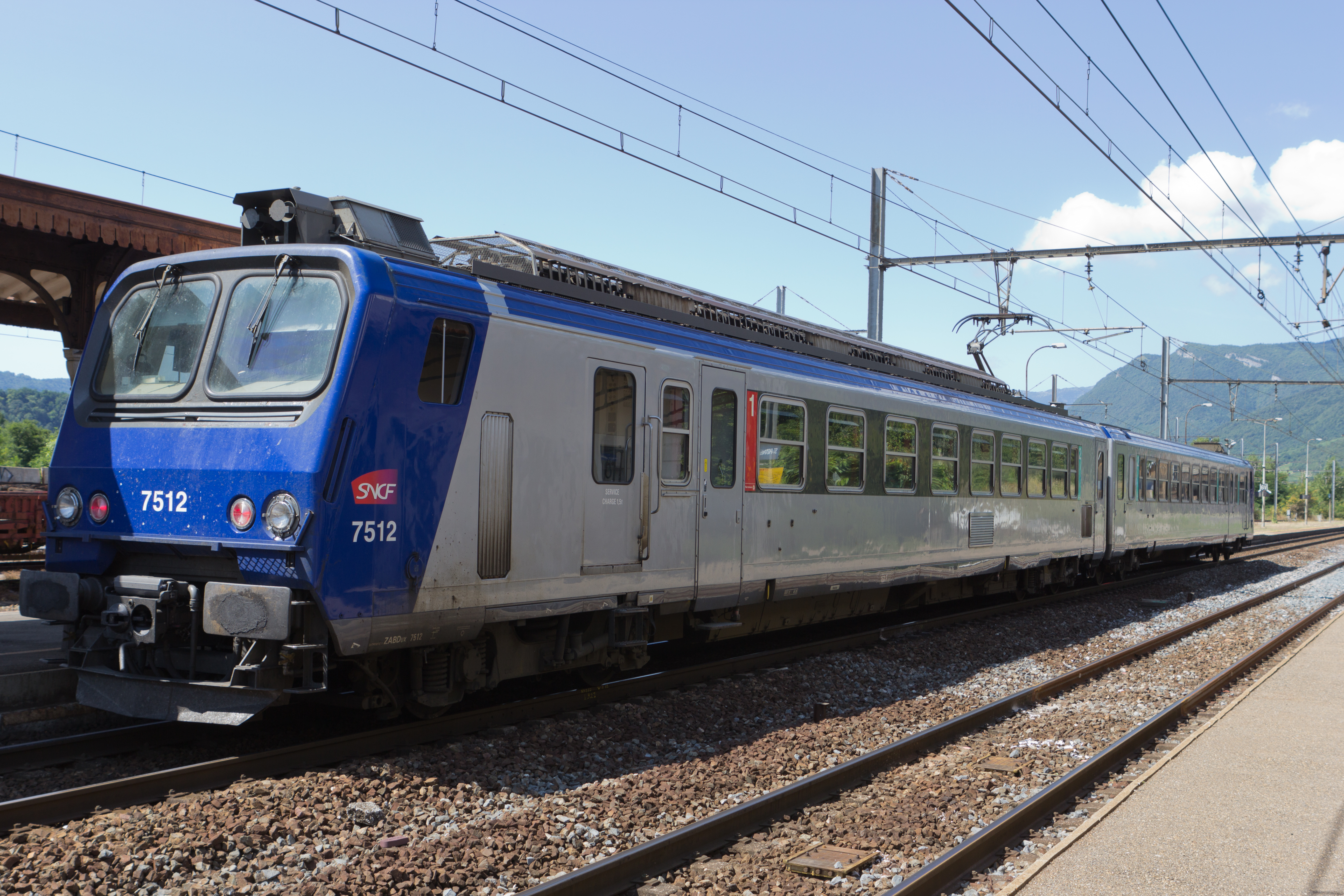 Gare de Saint-Pierre-d'Albigny, commune de Saint-Pierre-d'Albigny, département de la Savoie, France